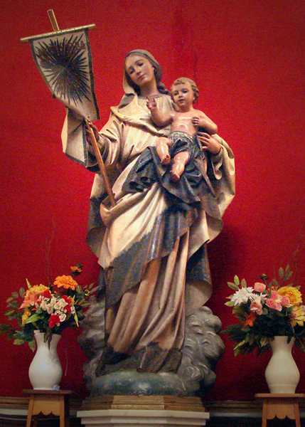 Nossa Senhora da Paz, no interior da Igreja de Santo Antônio, Porto Alegre, Brasil.